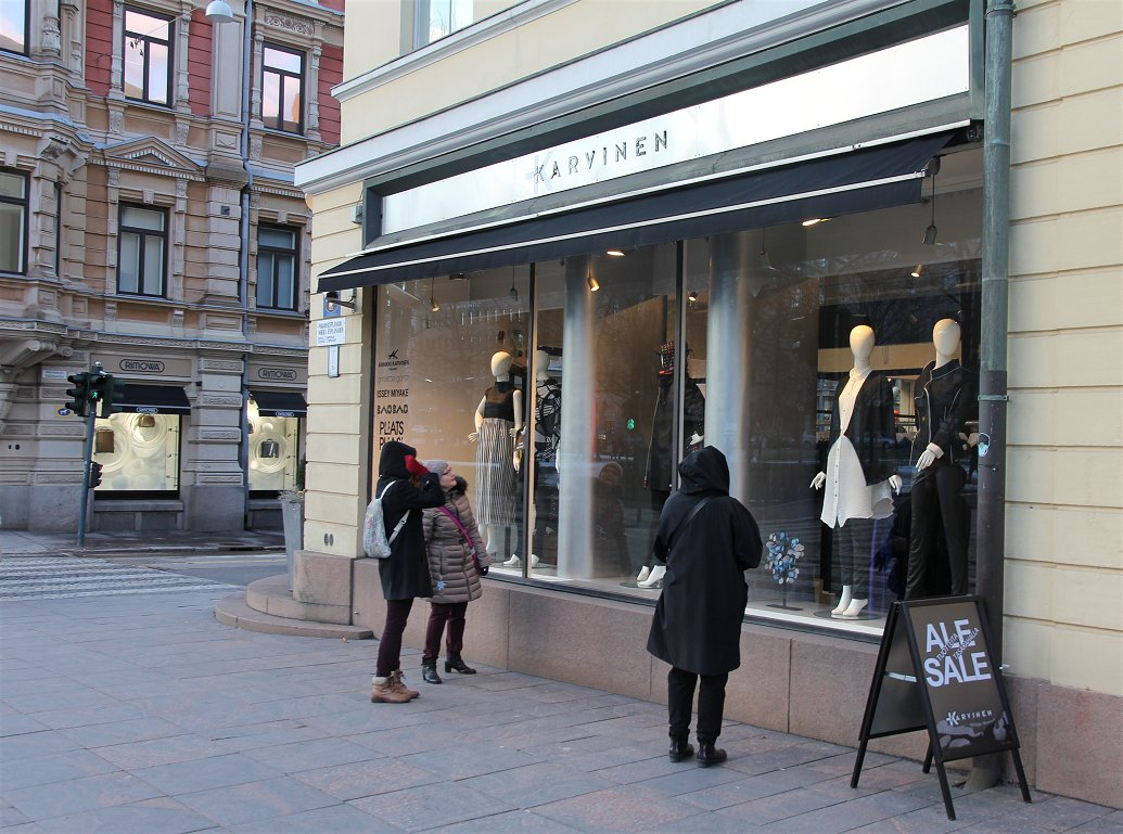 Tekstiilitaiteilija Annikki Karvisen nimeä kantava vaatemyymälä Helsingin Pohjoisesplanadilla.